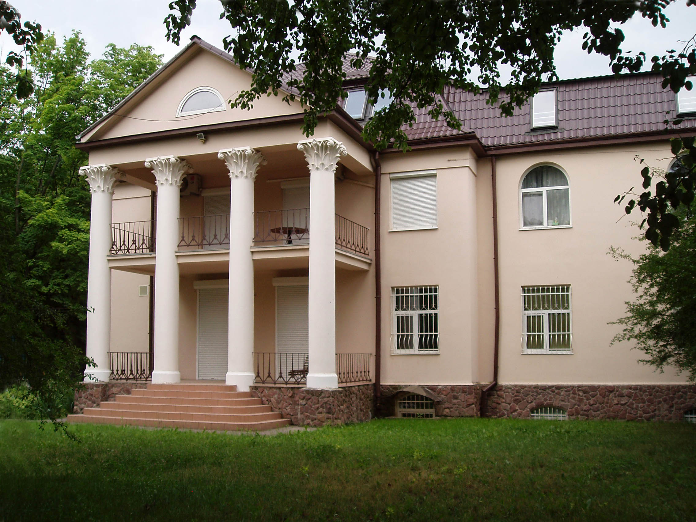 Будинок у Львові на вулиці Коновальця, 78, на розі із вулицею Залізняка. Збудований 1925 року за проектом Яна Новорити.